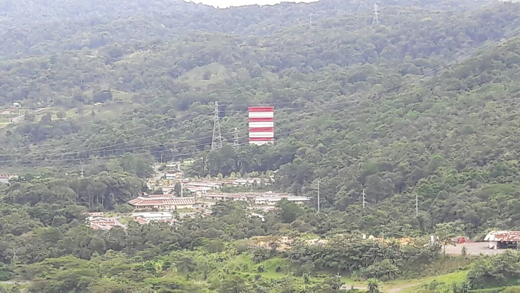 La represa hidroeléctrica Reventazón, construida por el Instituto Costarricense de Electricidad, es la más grande de Centroamérica y la segunda obra de infraestructura más grande del istmo luego del Canal de Panamá.